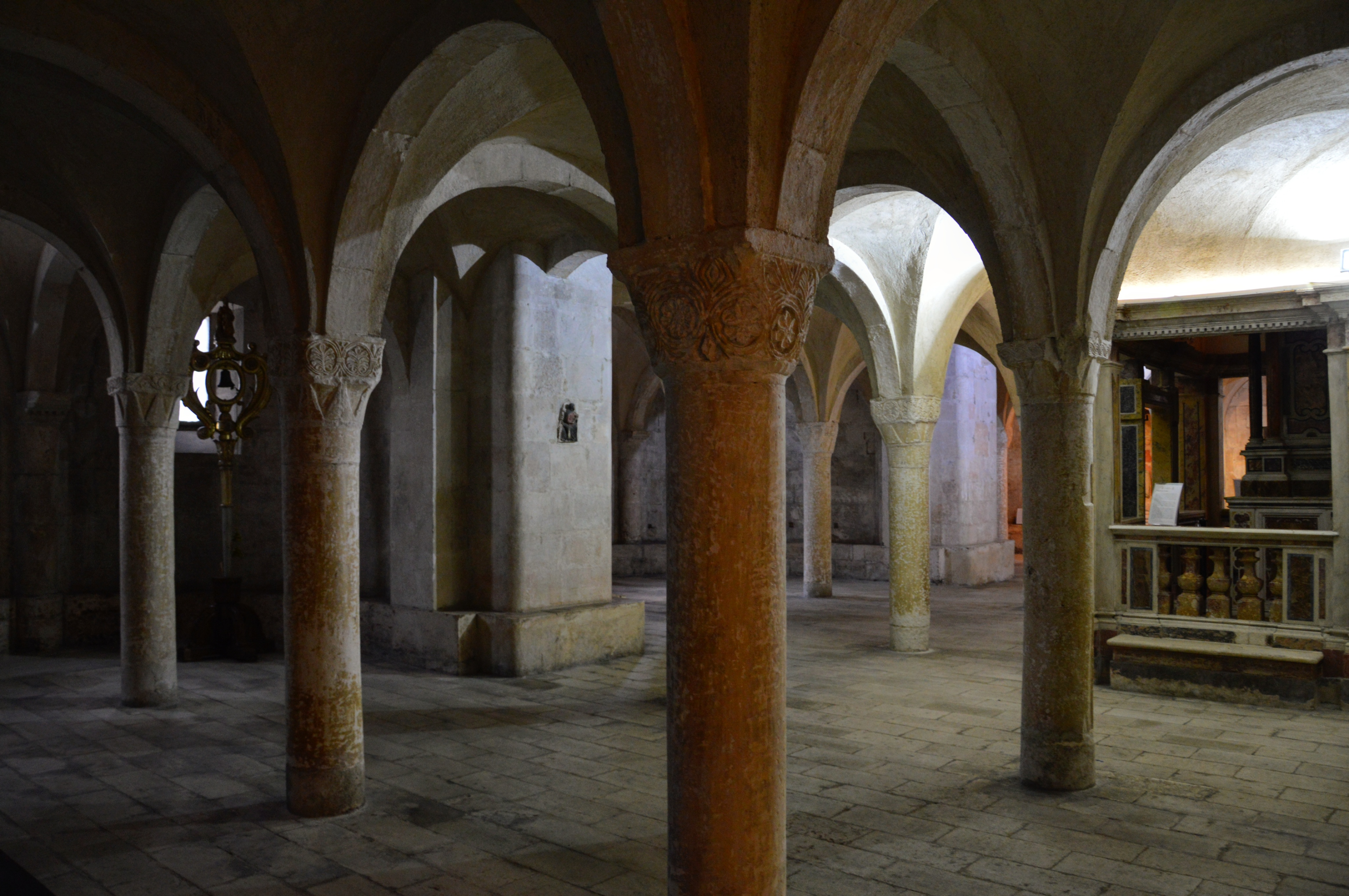 Cripta della Cattedrale di San Panfilo, Sulmona